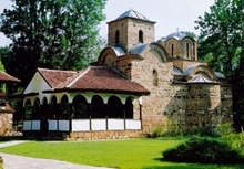 Погановски манастир, Kloster Poganowo